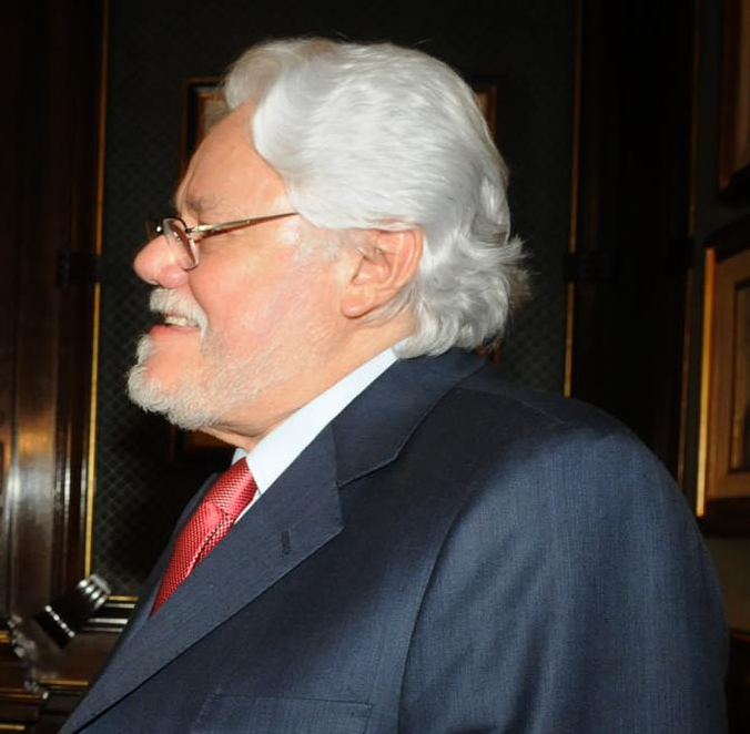 Carlos Gaviria presidente del Polo Democrático Alternativo (croped verison of ).